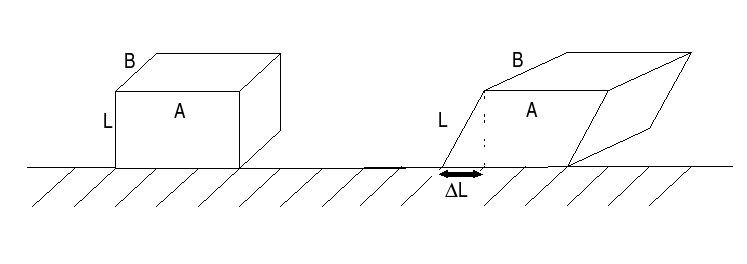 Schéma du cisaillement d'un solide Catégorie:Schéma de physique